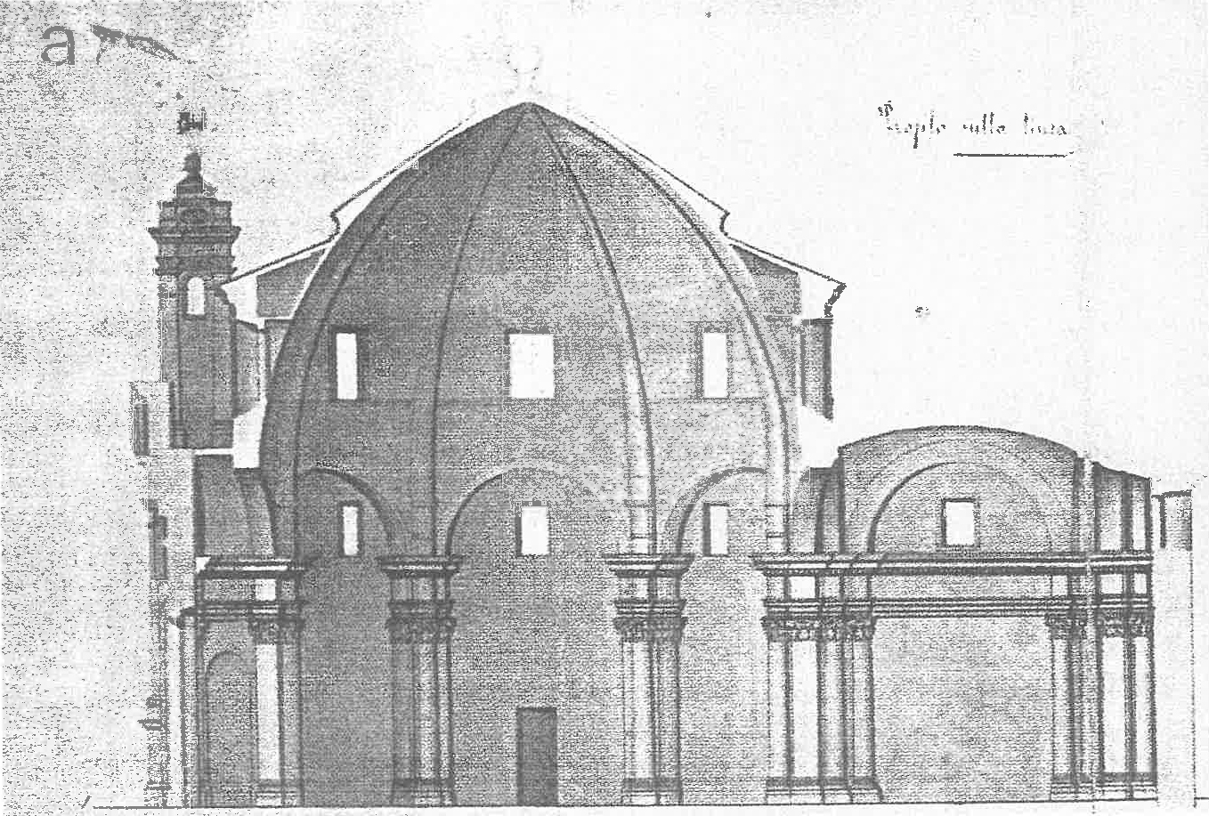 Progetto di recupero del 1837 della chiesa di Santa Gerusalemme di Pescara